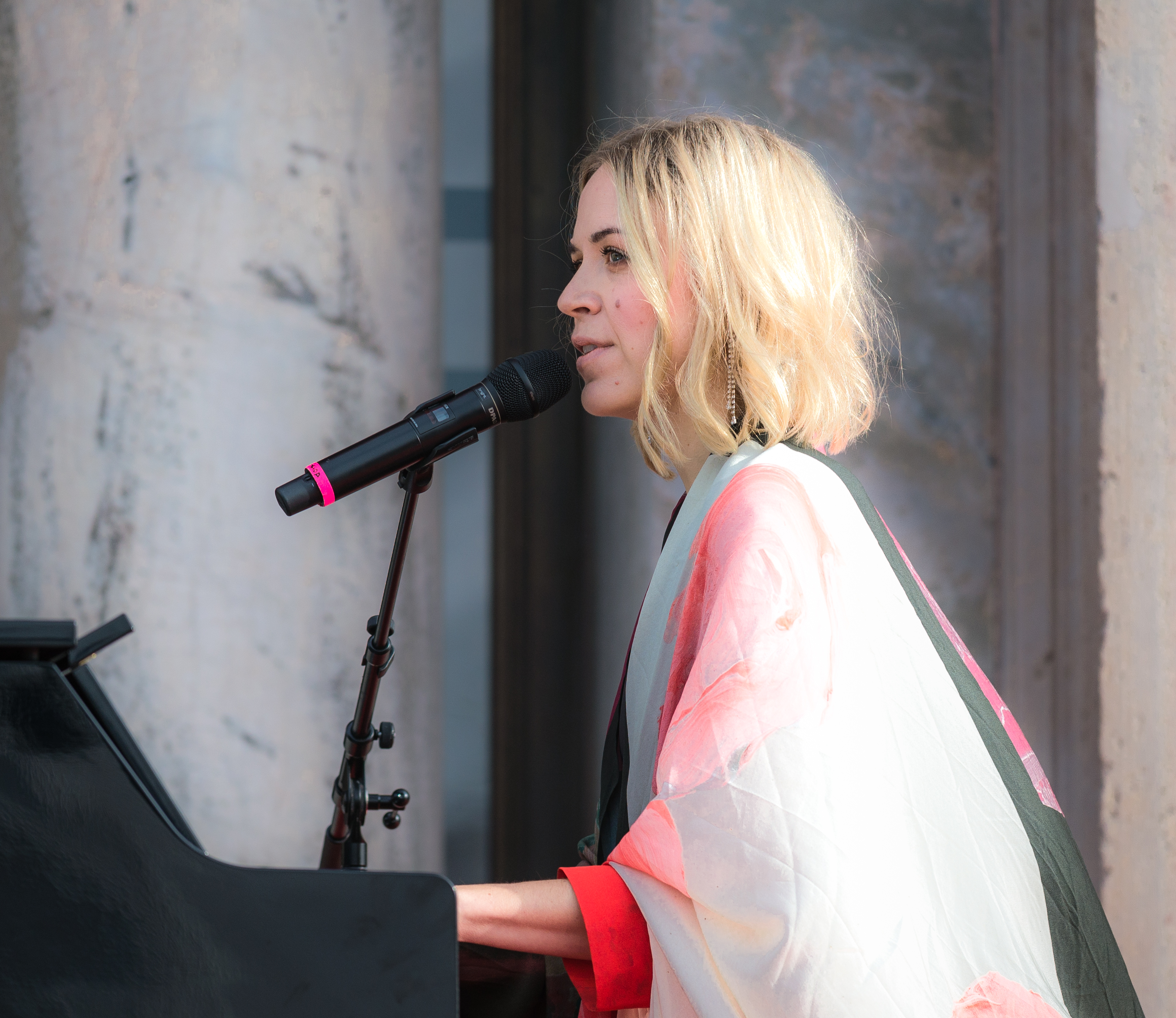 Frida Hyvönen uppträder i samband med nyinvigningen av Nationalmuseum i Stockholm den 13 oktober 2018.